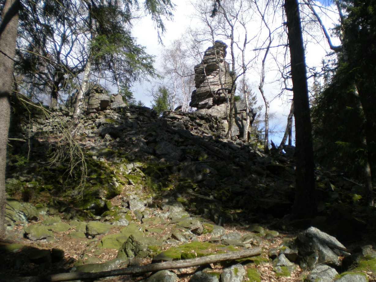 Skalní útvar Komín na vrchu Koníček (667 m) nedaleko Jinec.